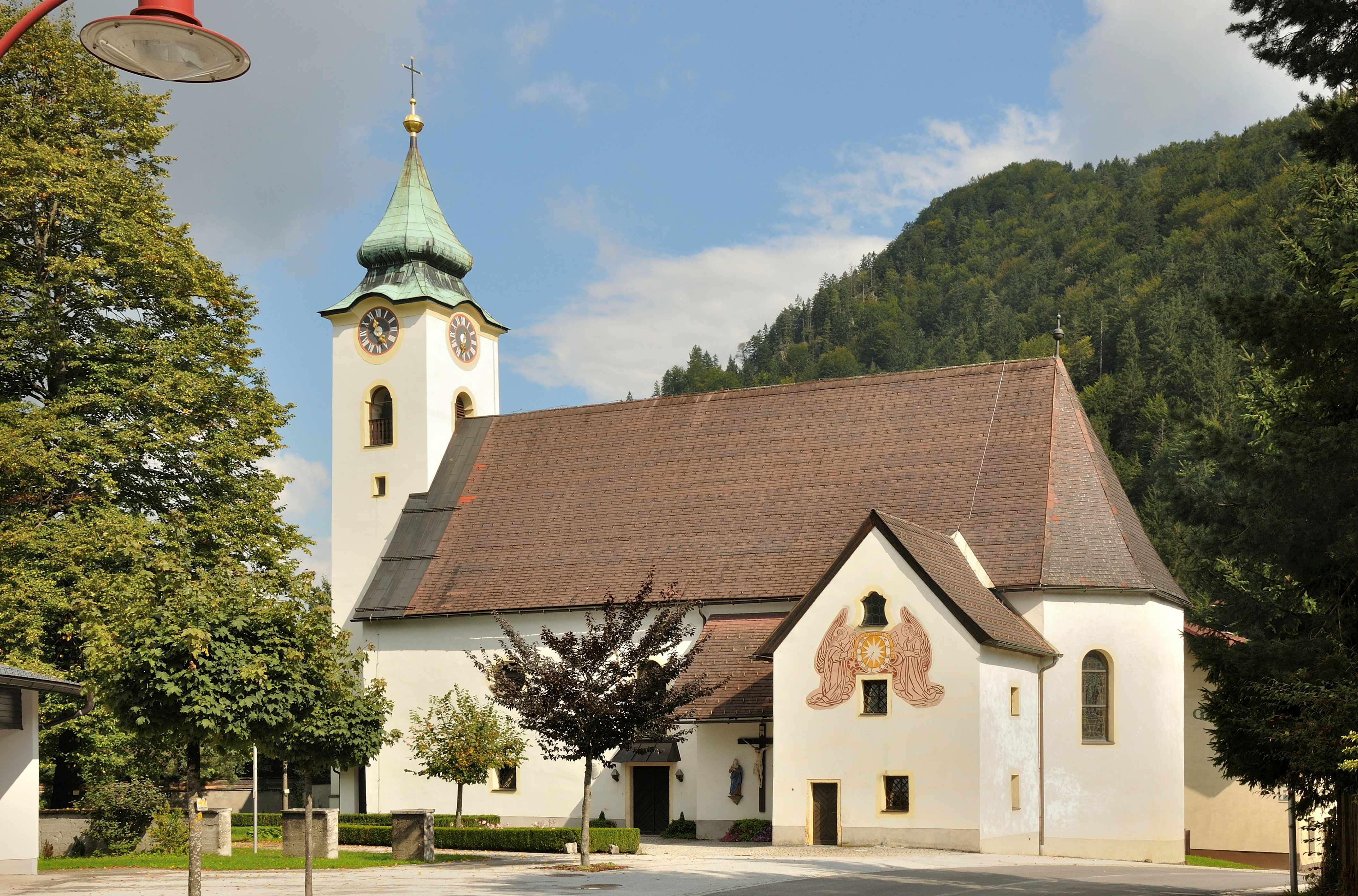 Kath. Pfarrkirche hl. Nikolaus und ehem. Friedhofsfläche